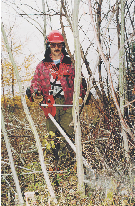 Débroussailleur à l'oeuvre